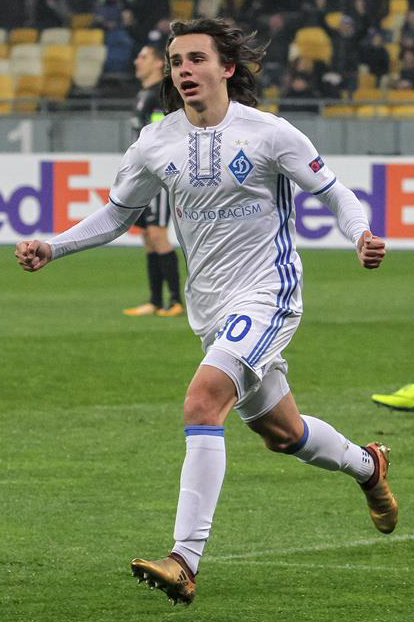 Динамо - Партизан 4:1. Команда Александра Хацкевича без проблем обыграла Партизан и выиграла свою группу (4:1).